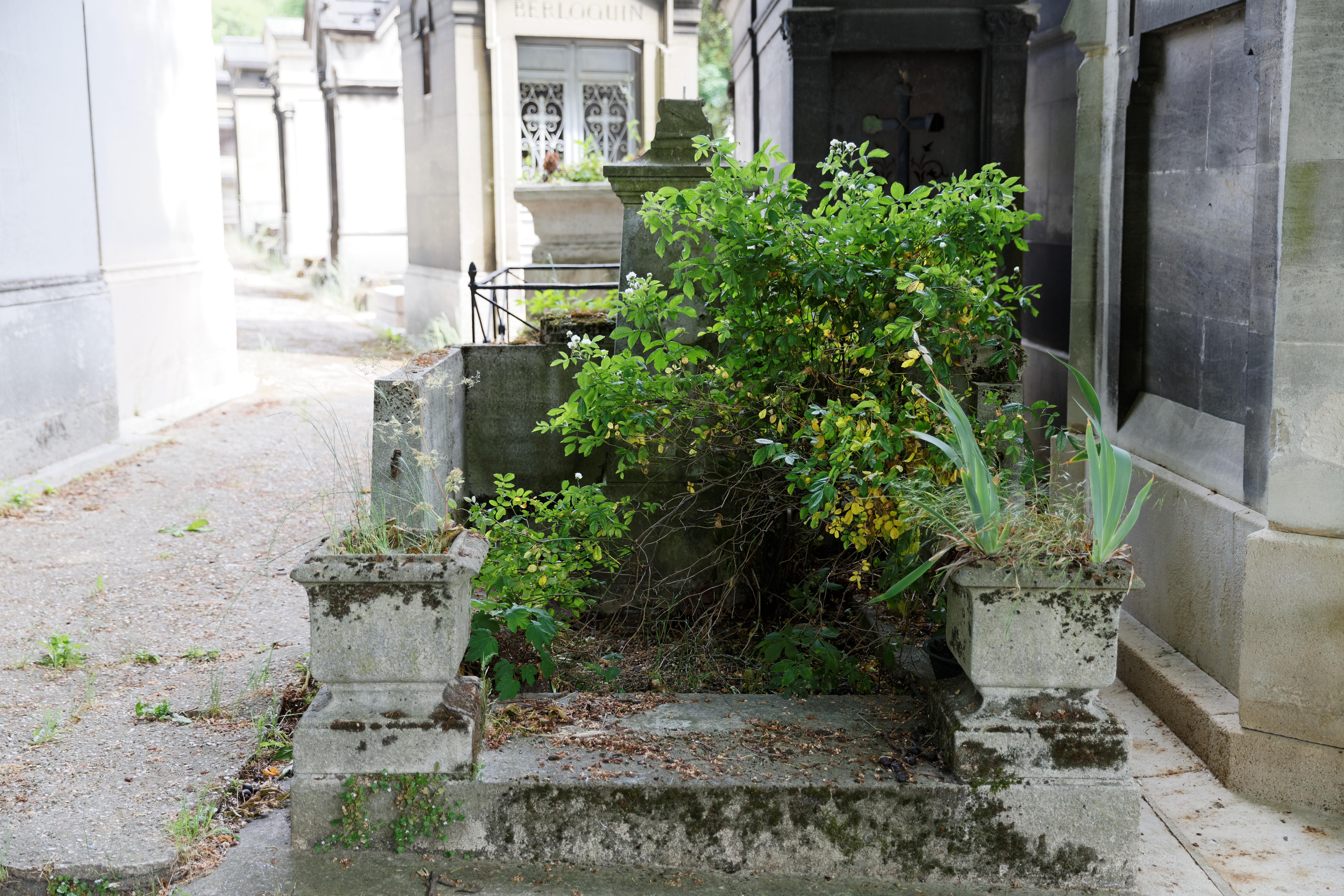 Sépulture d'Anaïs Ségalas (1811-1895), dramaturge, poétesse et romancière. Stèle ornée à l'origine d'un médaillon en bronze signé David d'Angers.